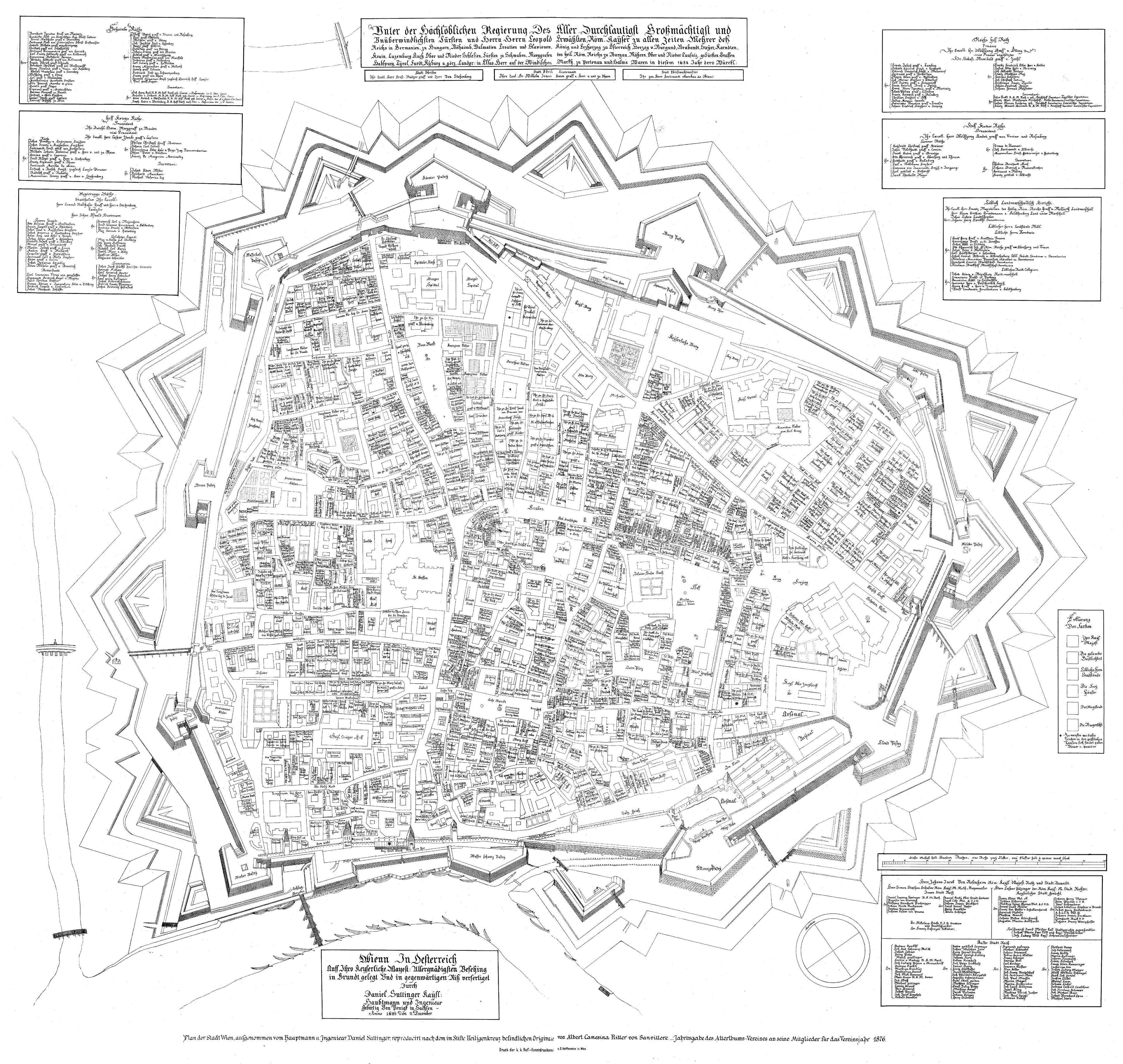 Grundrissplan der Stadt Wien mit Stand von 1683, Ausrichtung nach Südwesten, datiert mit 11. Dezember 1684; Reproduktion durch Albert Camesina als Lithographie 1876, Original nach verschollen; in den Häusern die Namen der Besitzer